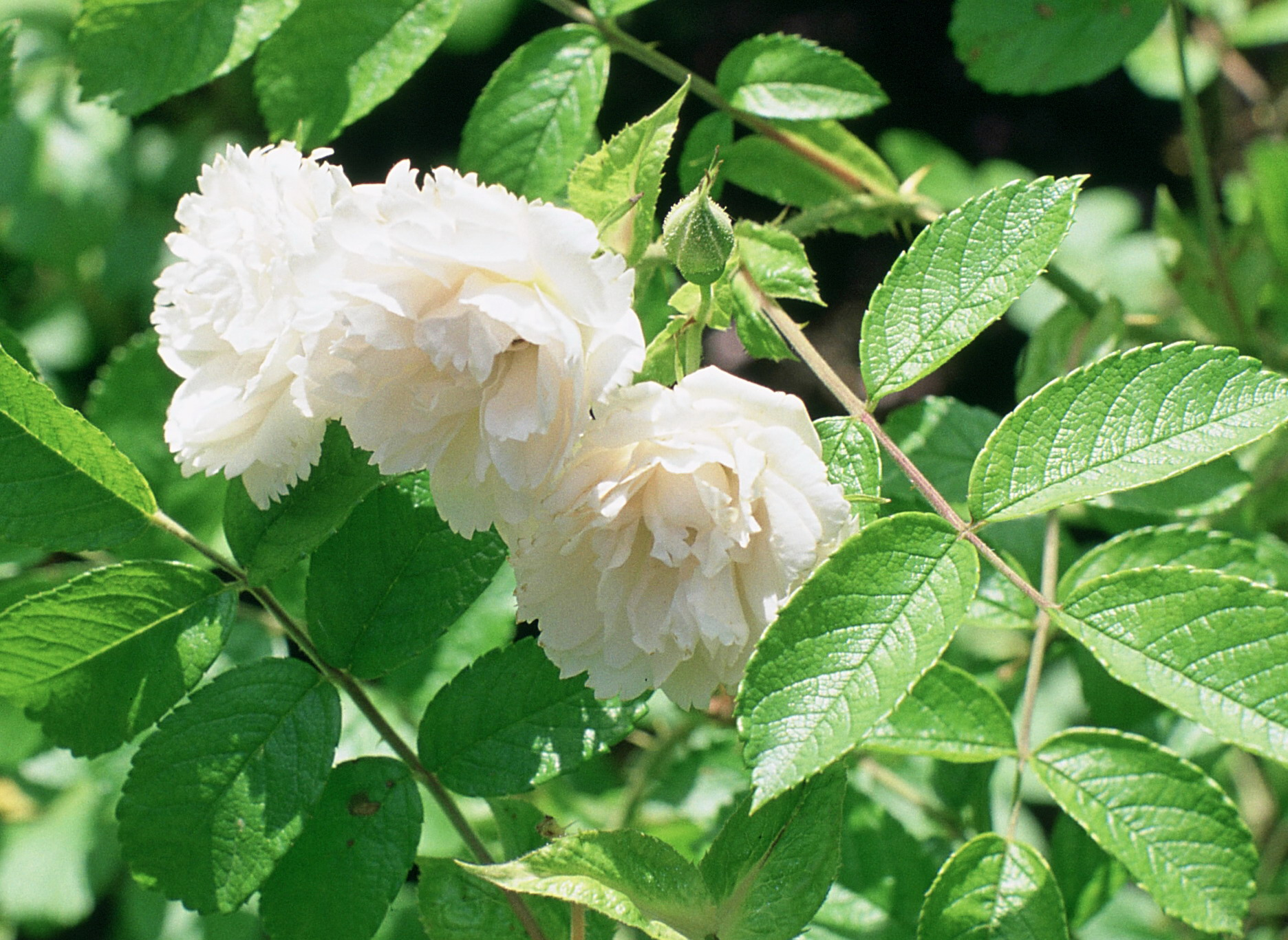 Rosa 'White Grootendorst', Hybr. Rugosa, sect. Cassiorhodon. Real Jardín Botánico, Madrid